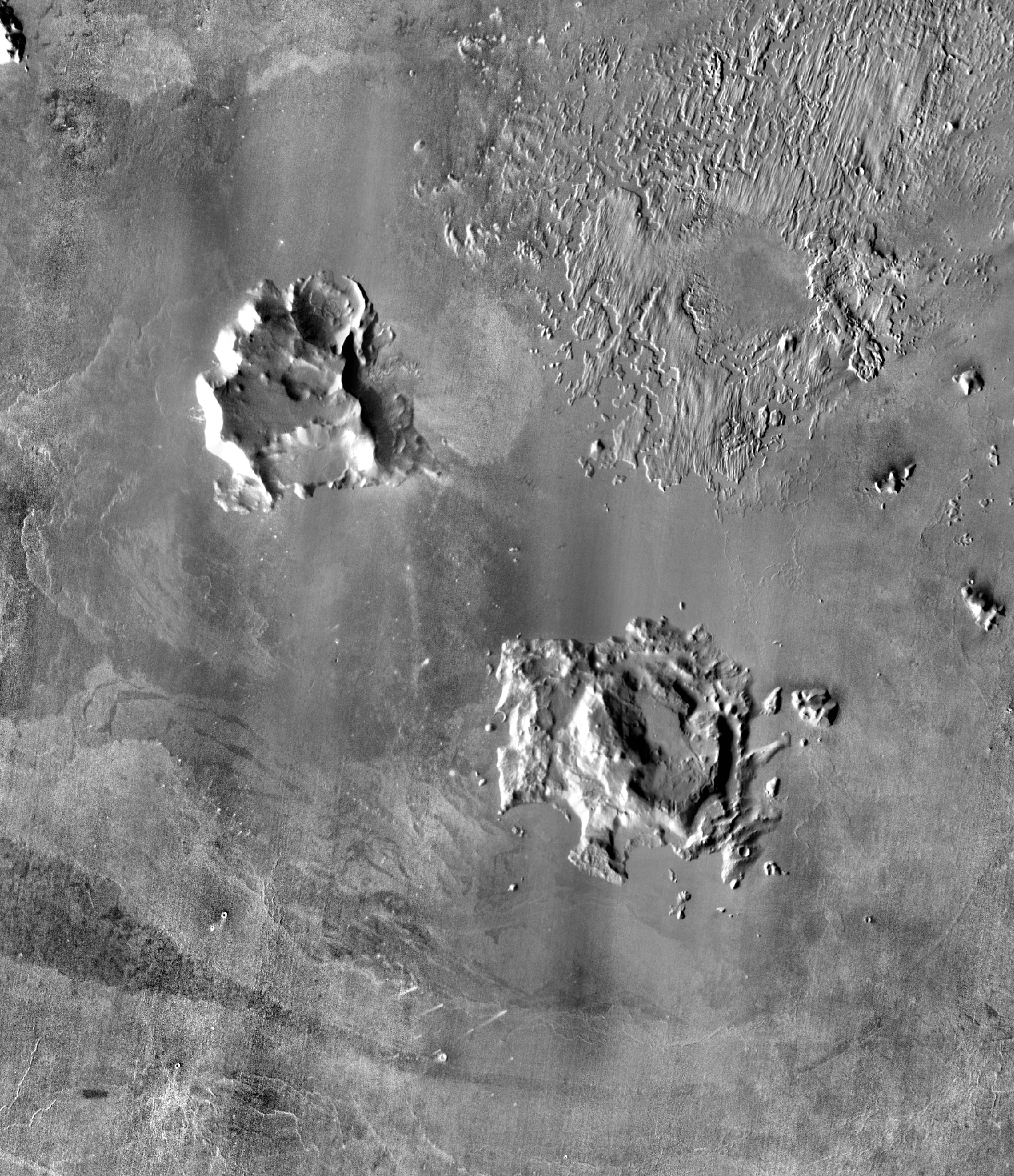 Hibes Montes (THEMIS Day). Marte.